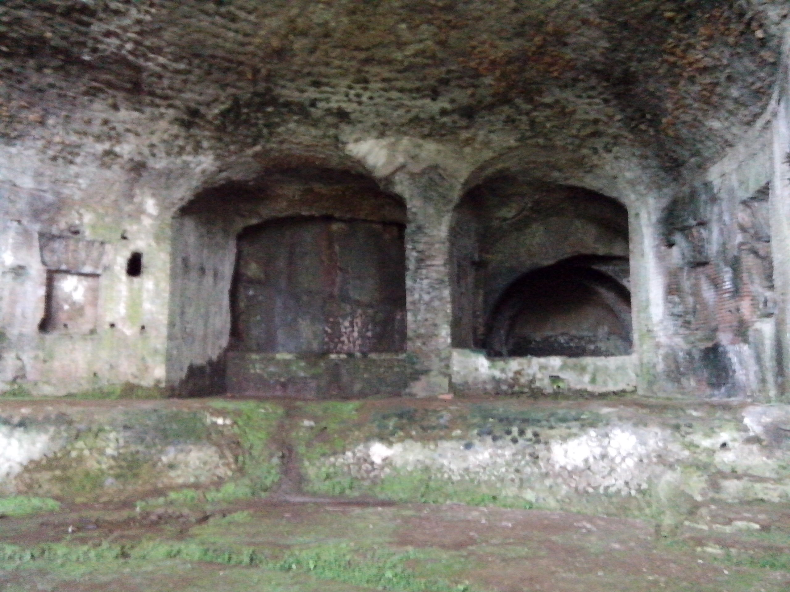 Ninfeo del Bergantino alla rive del lago Albano - Castel Gandolfo (Roma)